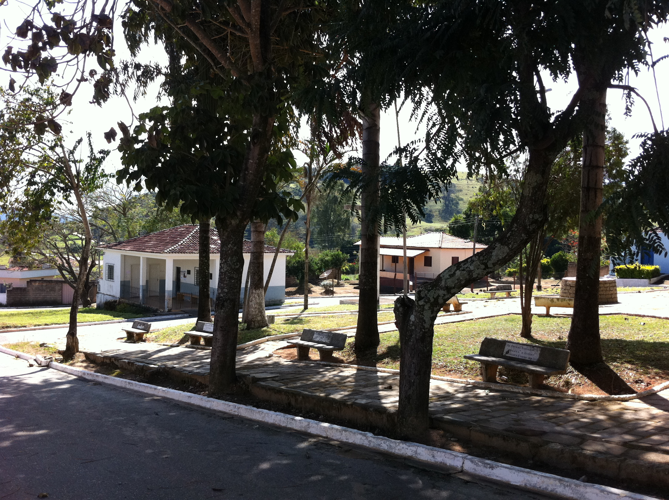 Posto de Saúde